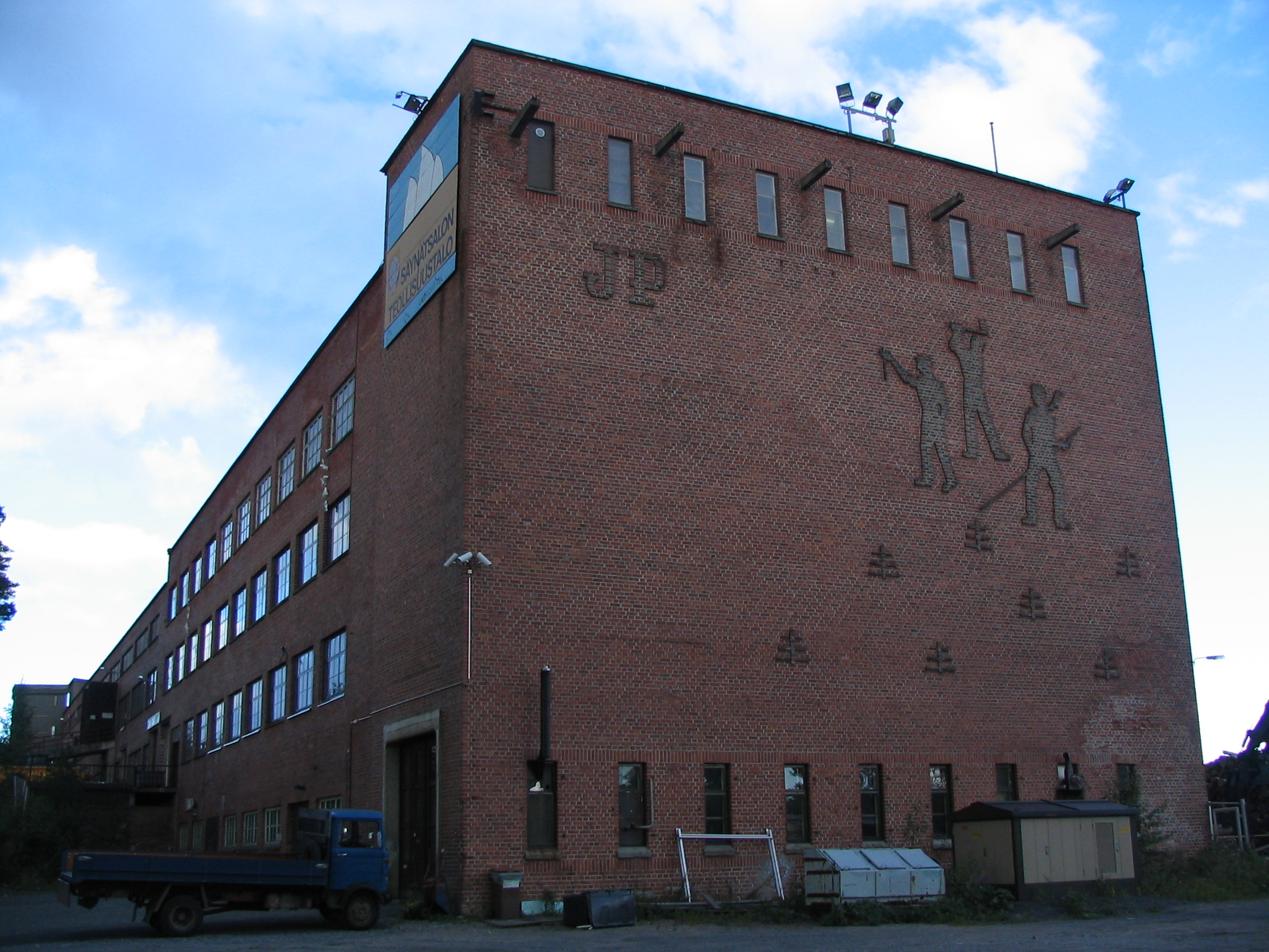 Former fibreboard factory, Place: Säynätsalo, Jyväskylä, Finland ; Architect: Karl Stigzelius